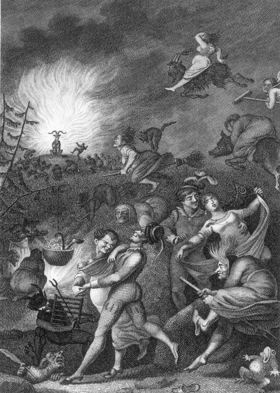 Kupferstich von W. Jury nach Johann Heinrich Ramberg - Walpurgisnachtszene aus Faust 1